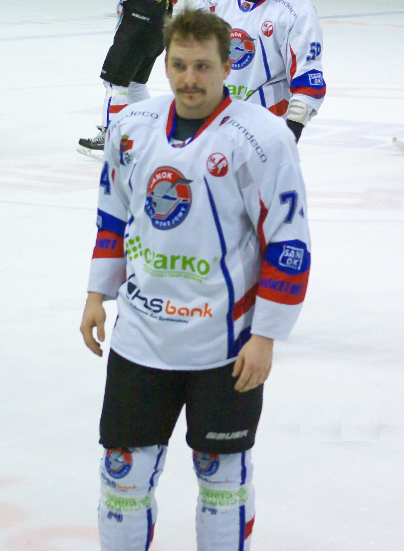 Szósty mecz finałowy o mistrzostwo Polski w hokeju na lodzie w sezonie PHL 2013/2014: Ciarko PBS Bank KH Sanok – GKS Tychy (2:0), 3 kwietnia 2014 w Sanoku (Arena Sanok). Nicolas Besch